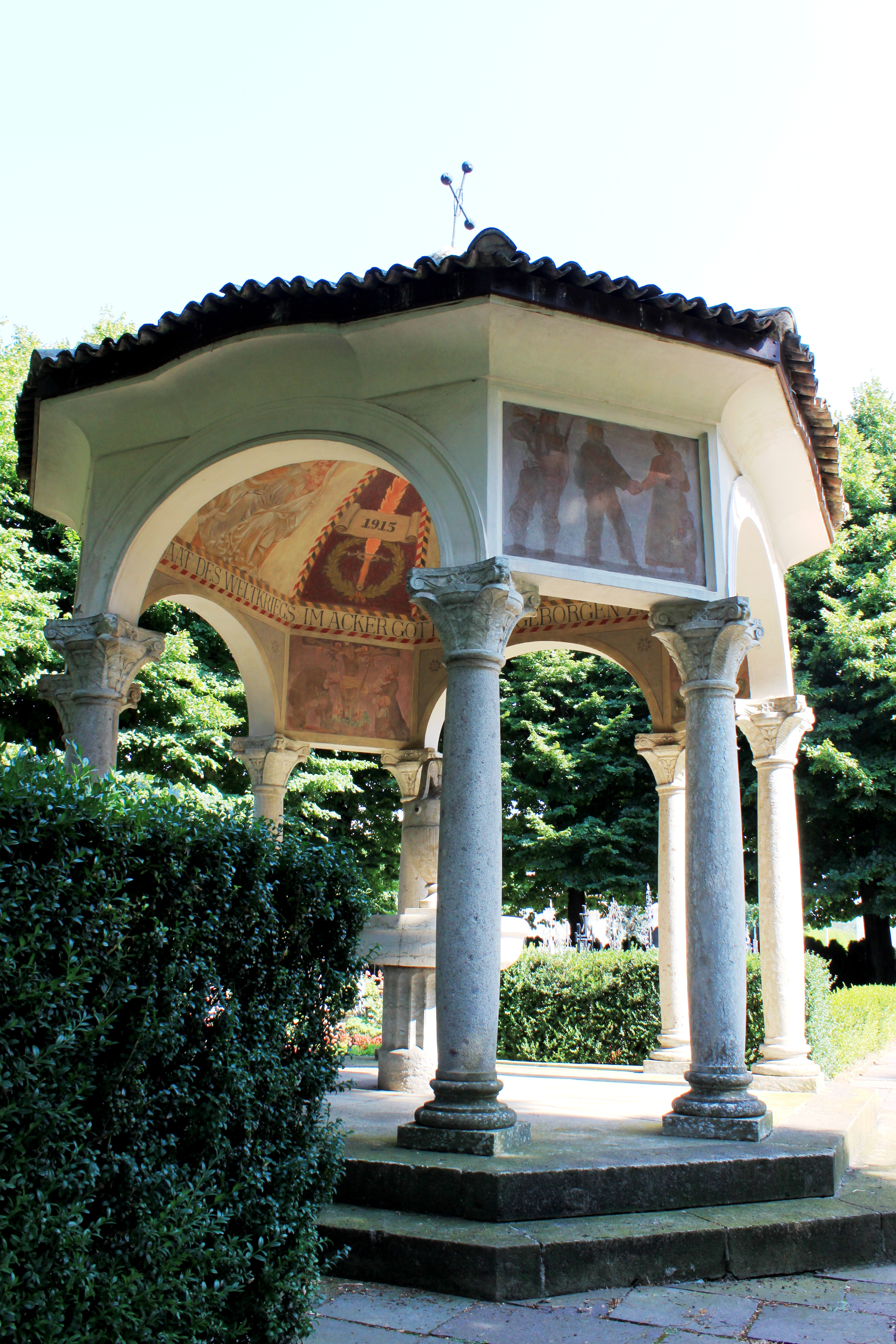 Österreichischer Soldatenfriedhof in Bozen - Pavillon von Gustav Nolte mit Deckenbildern von Albert Stolz